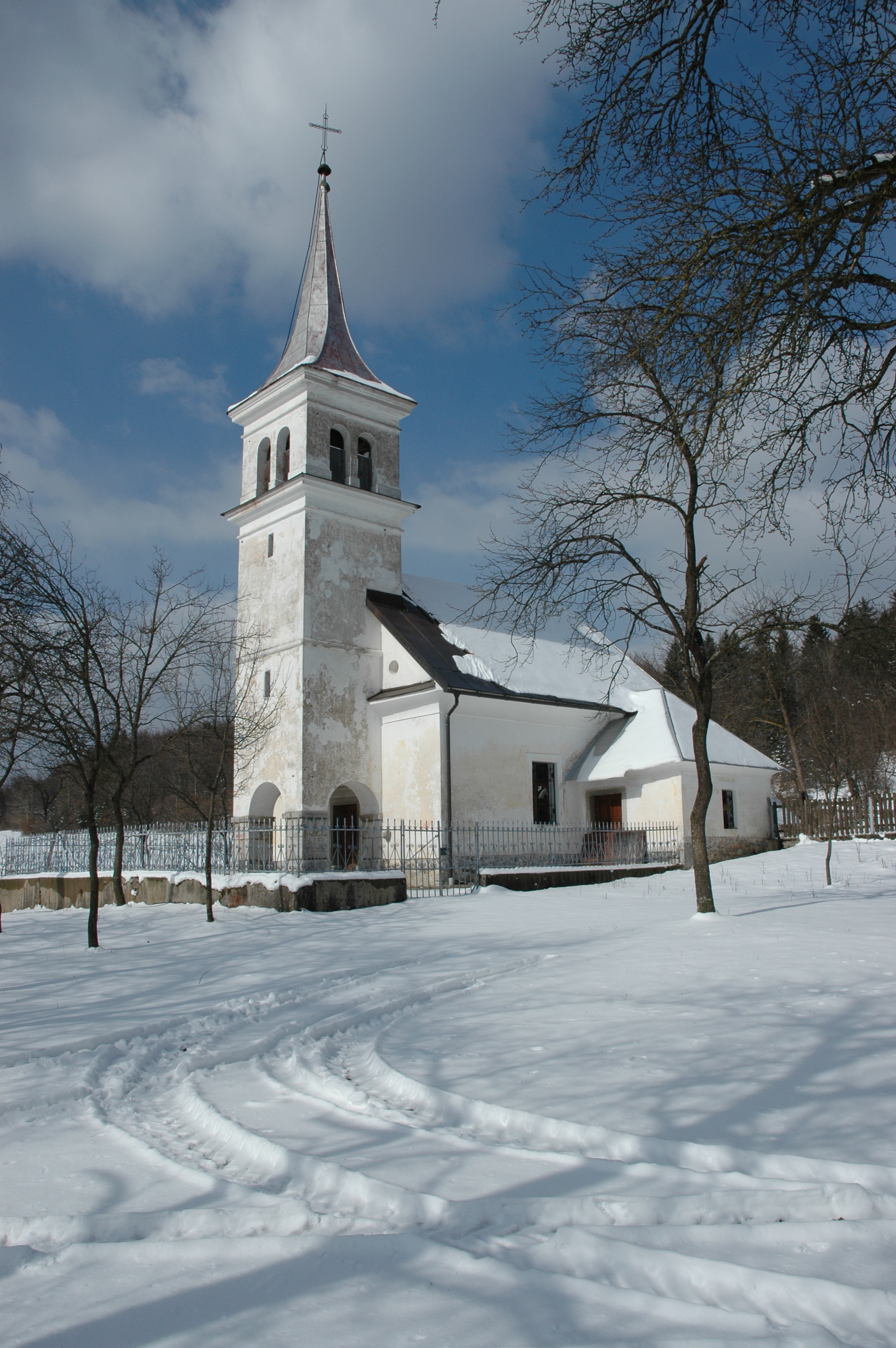 Foto: Alenka Veber, podružnična cerkev sv. Antona Puščavnika